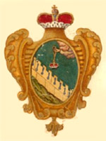 Муром, герб (1730)